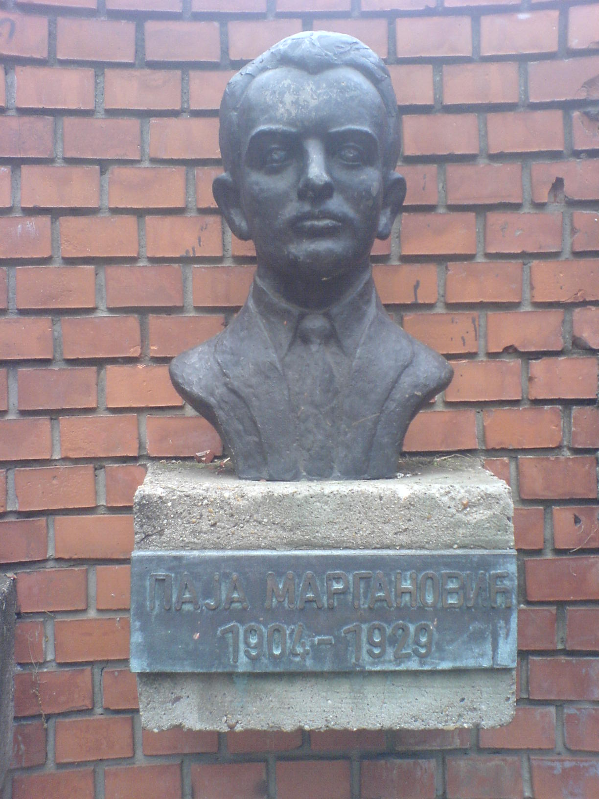 Биста Паје Маргановића (1904-1929), једног од седморице секретара СКОЈ, у дворишту ОШ „Седам секретара СКОЈ-а“ на Новом Београду.